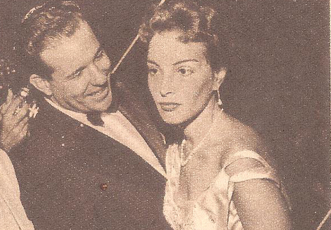 João Goulart e Maria Tereza no Baile do Copacabana Palace e fevereiro de 1956 (Foto: O Cruzeiro)